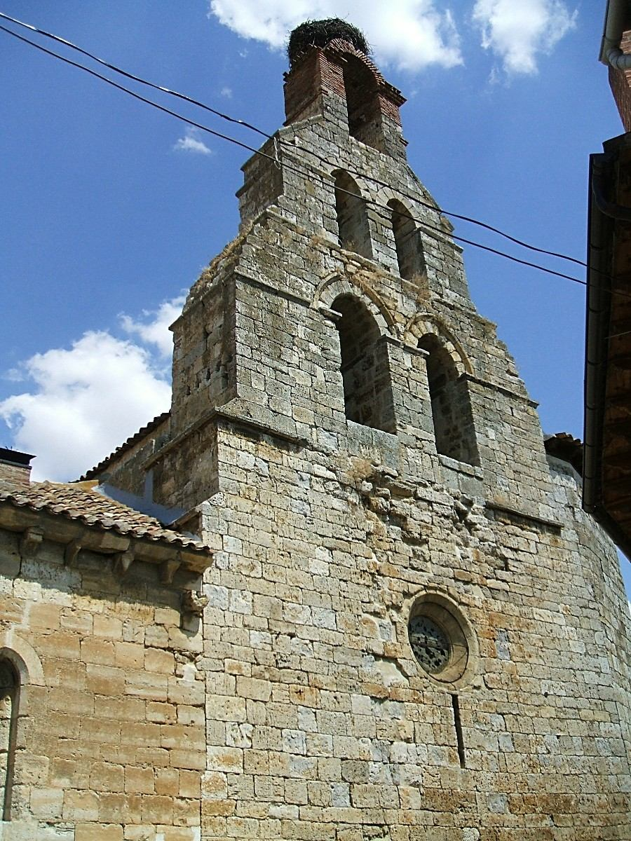 Iglesia de San Pedro, Astudillo, Palencia, Castilla y León, España